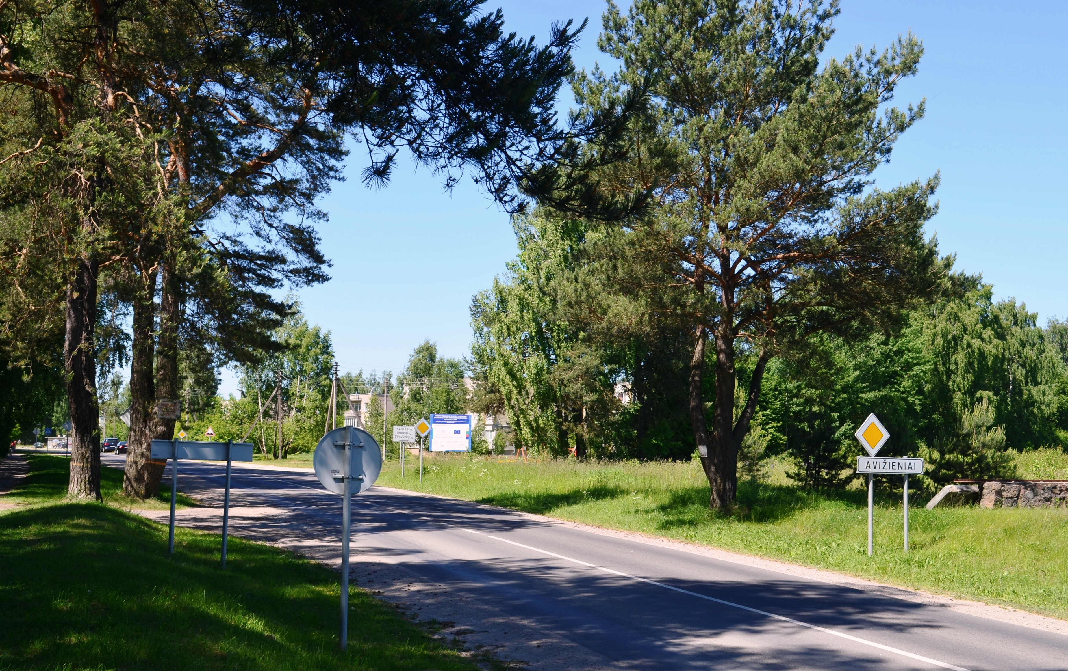 Avižieniai, Vilnius